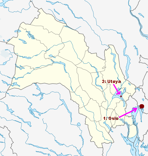 mapo montranta la lokojn de la du atakoj